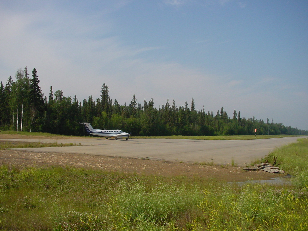 Pelican Airport